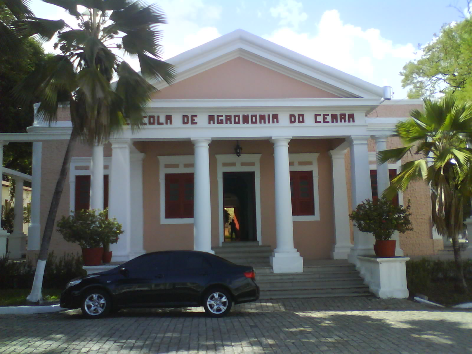 A primeira escola de Agronomia do estado do Ceará, que posteriormente, virou o primeiro curso da Universidade Federal do Ceará